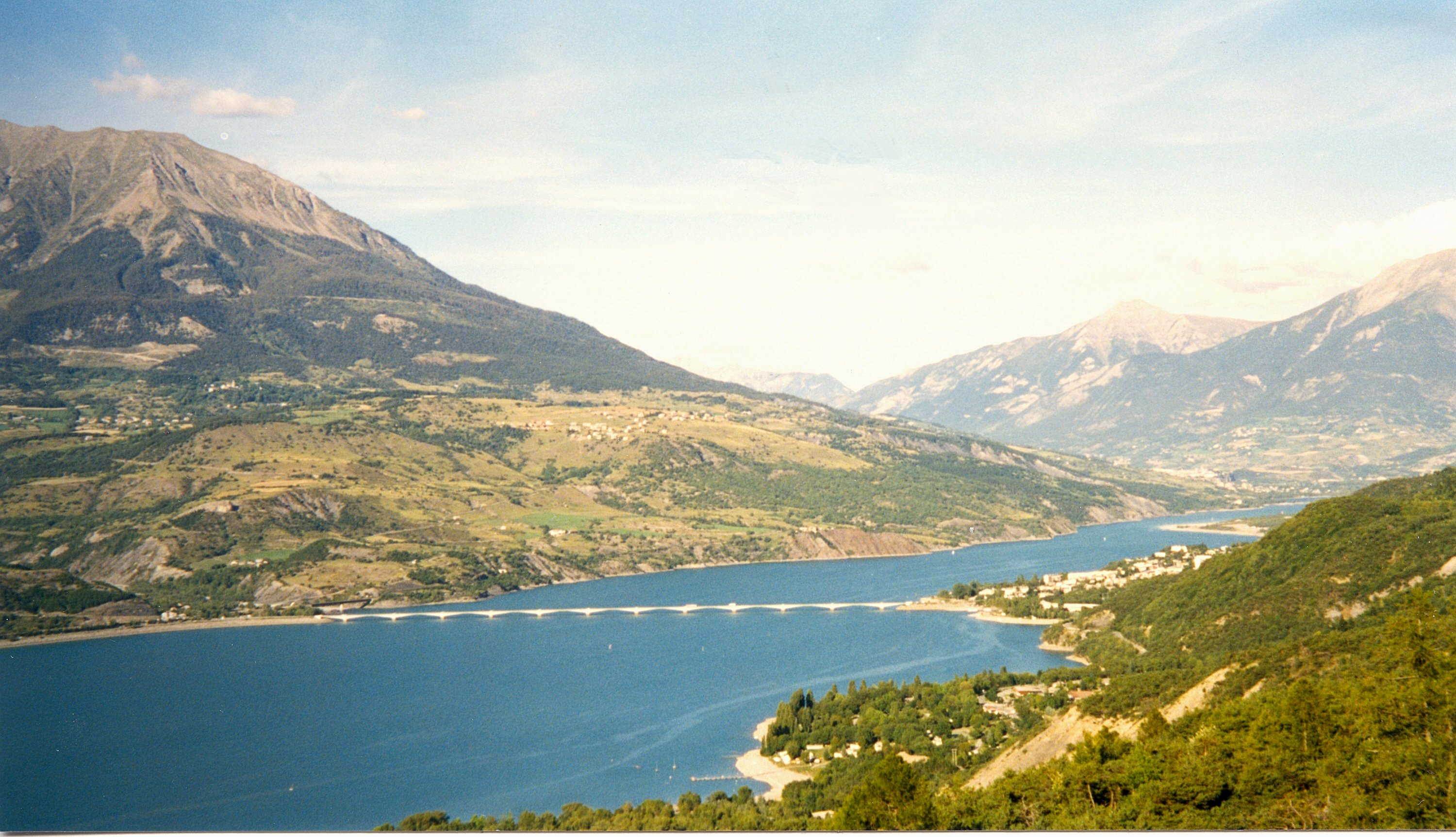 Lac de Serre-Poncon